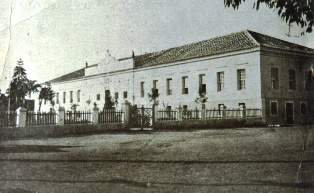 Colégio Abílio, do Barão de Macaúbas, Abílo César Borges, sede em Barbacena, Minas Gerais, fotografia do último quartel do século XIX.